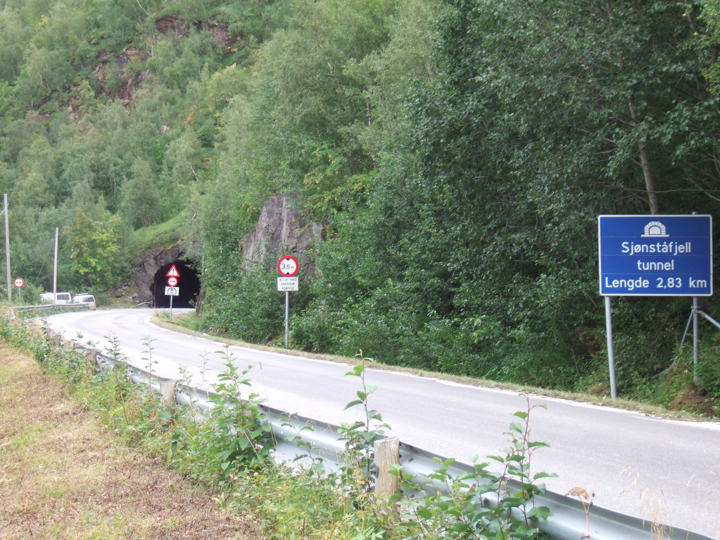 Sjønståfjelltunnel tilhørende fylkesvei 830 i Fauske kommune i Nordland.